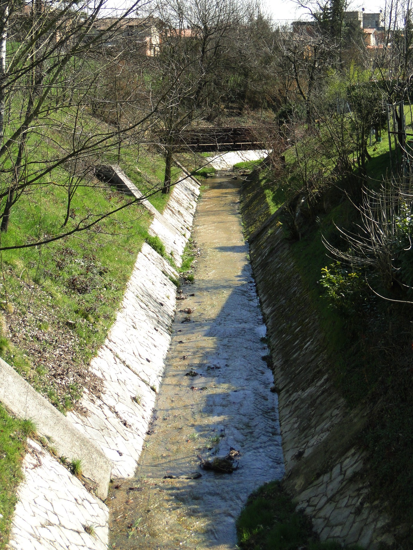 torrente Gardellone, Torre Boldone (BG), Italia